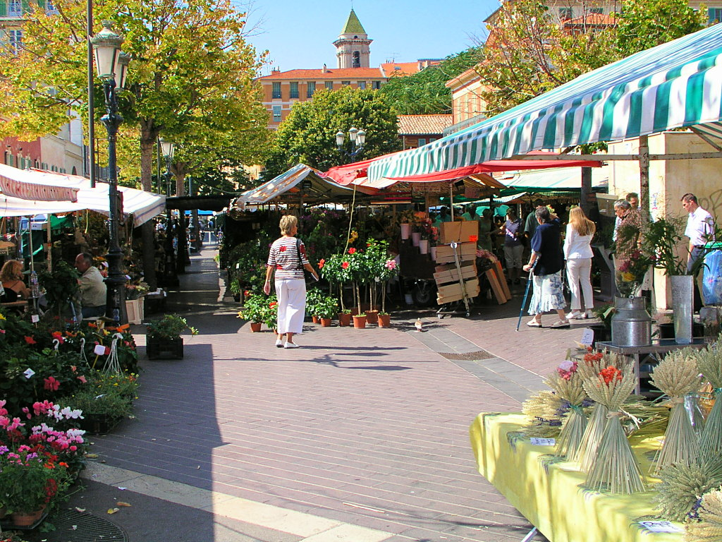 Nizza, vom Hafen aus fotografiert, Blick auf das Hotel Negresco. Fotografiert von